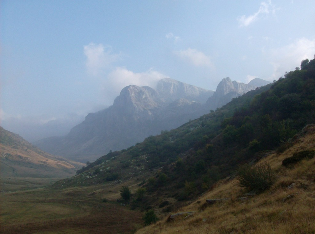 Cima delle Saline vista dalla Porta di Pian Marchisio (Valle Ellero, CN)